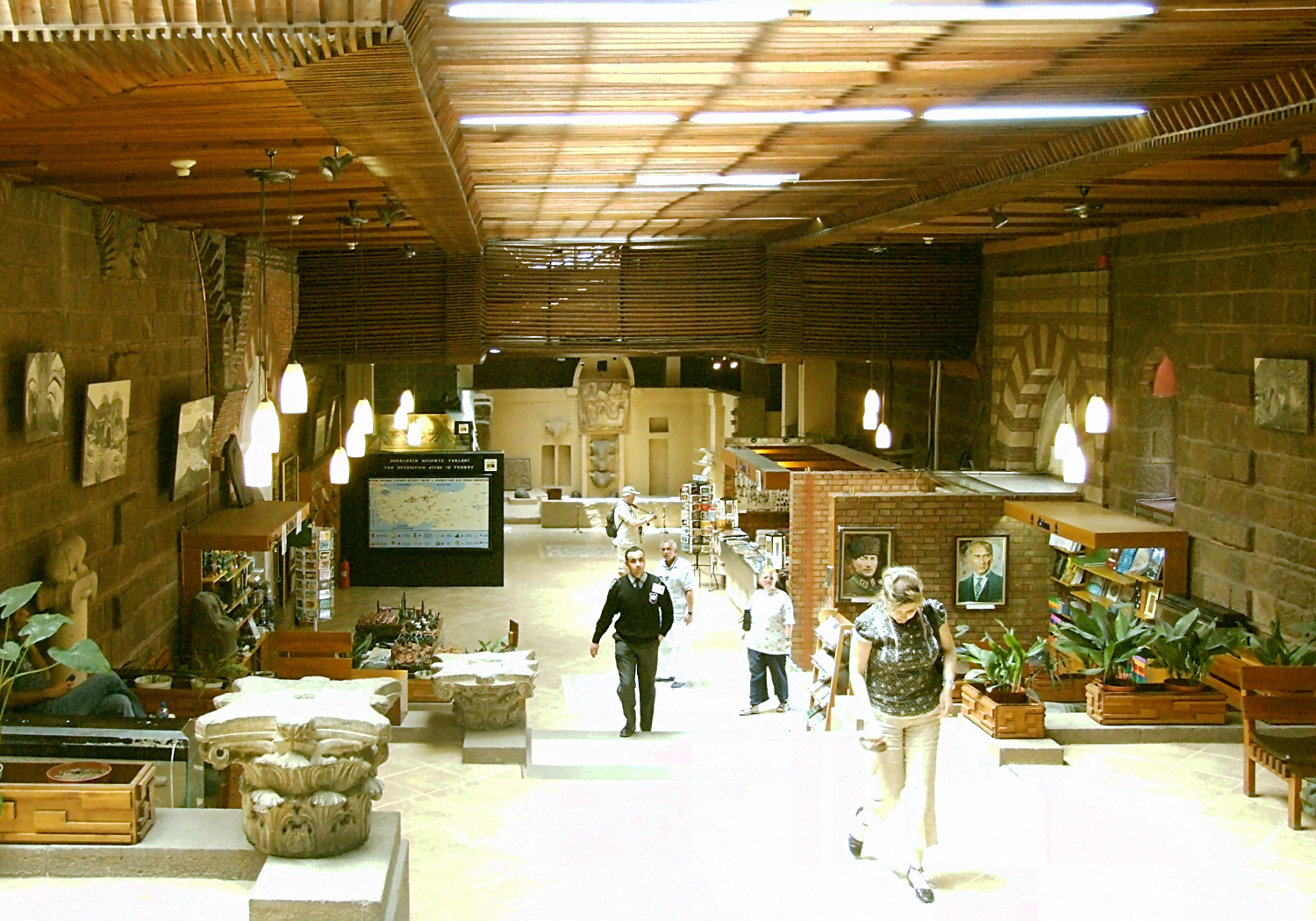 Muzeum Cywilizacji Anatolijskich w Ankarze; Museum of Anatolian Civilizations in Ankara